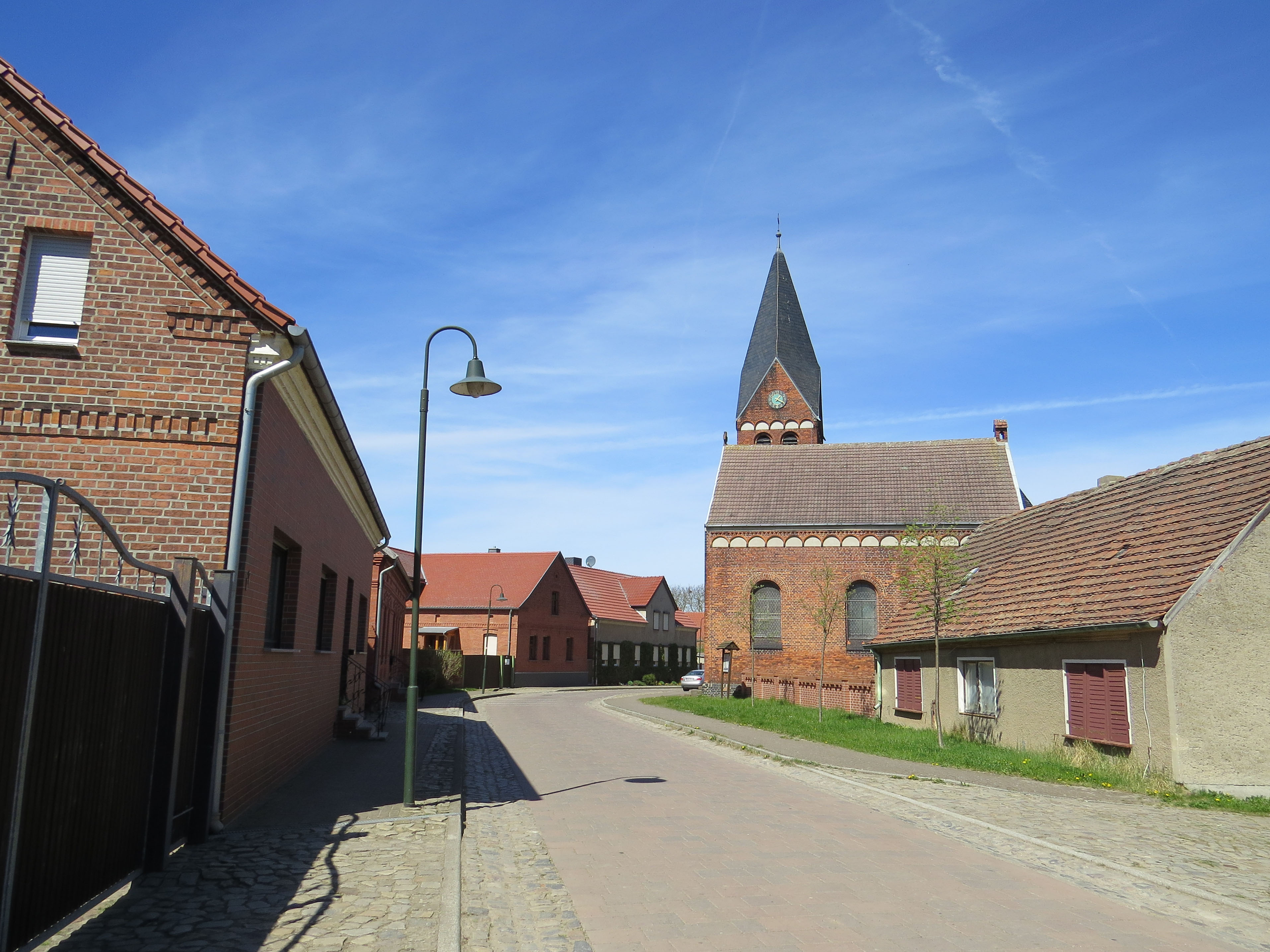 Dorfstr. in Schelldorf, Tangerhütte